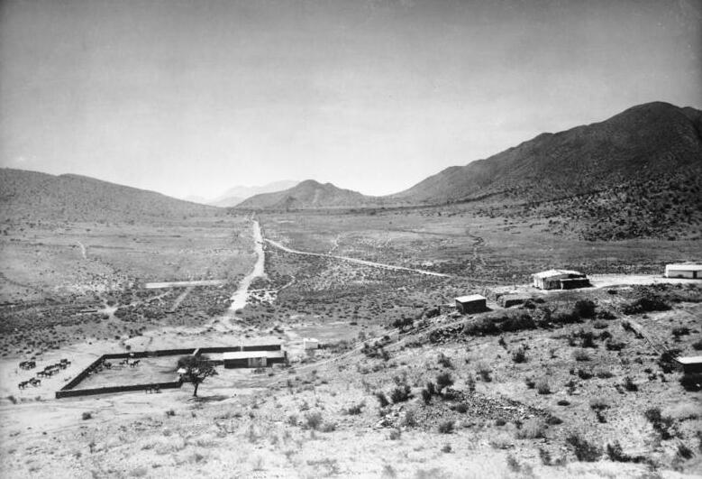 Gebirgslandschaft in Damaraland